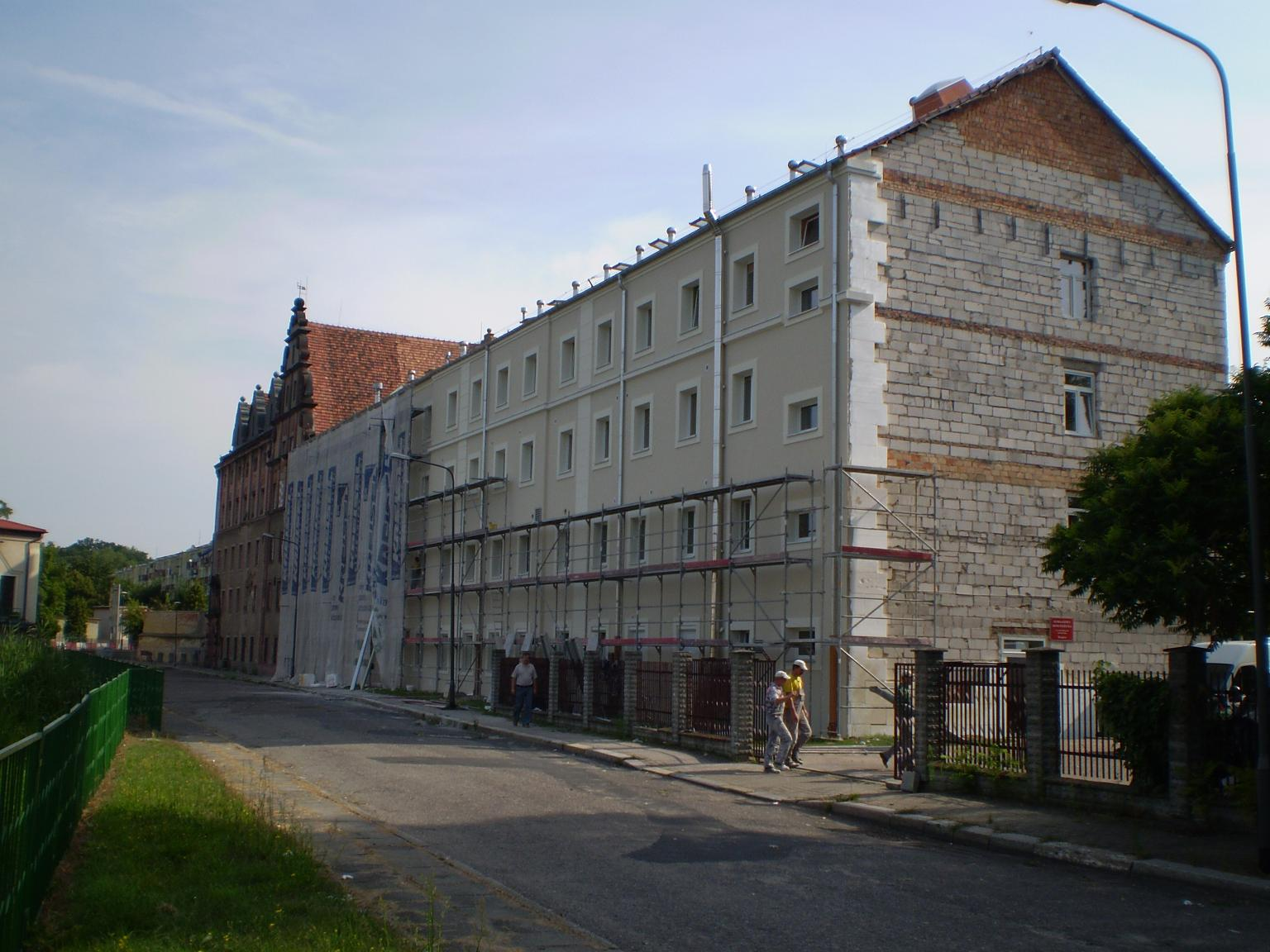 W tym budynku mieścił się internat ZSZ w Gubinie